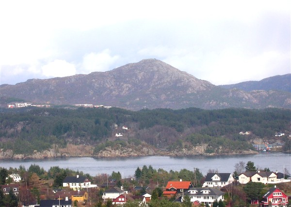 Mountain peak Lyderhorn outside Bergen, Norway. Picture taken by Gunnar Buvik 2006-04-17